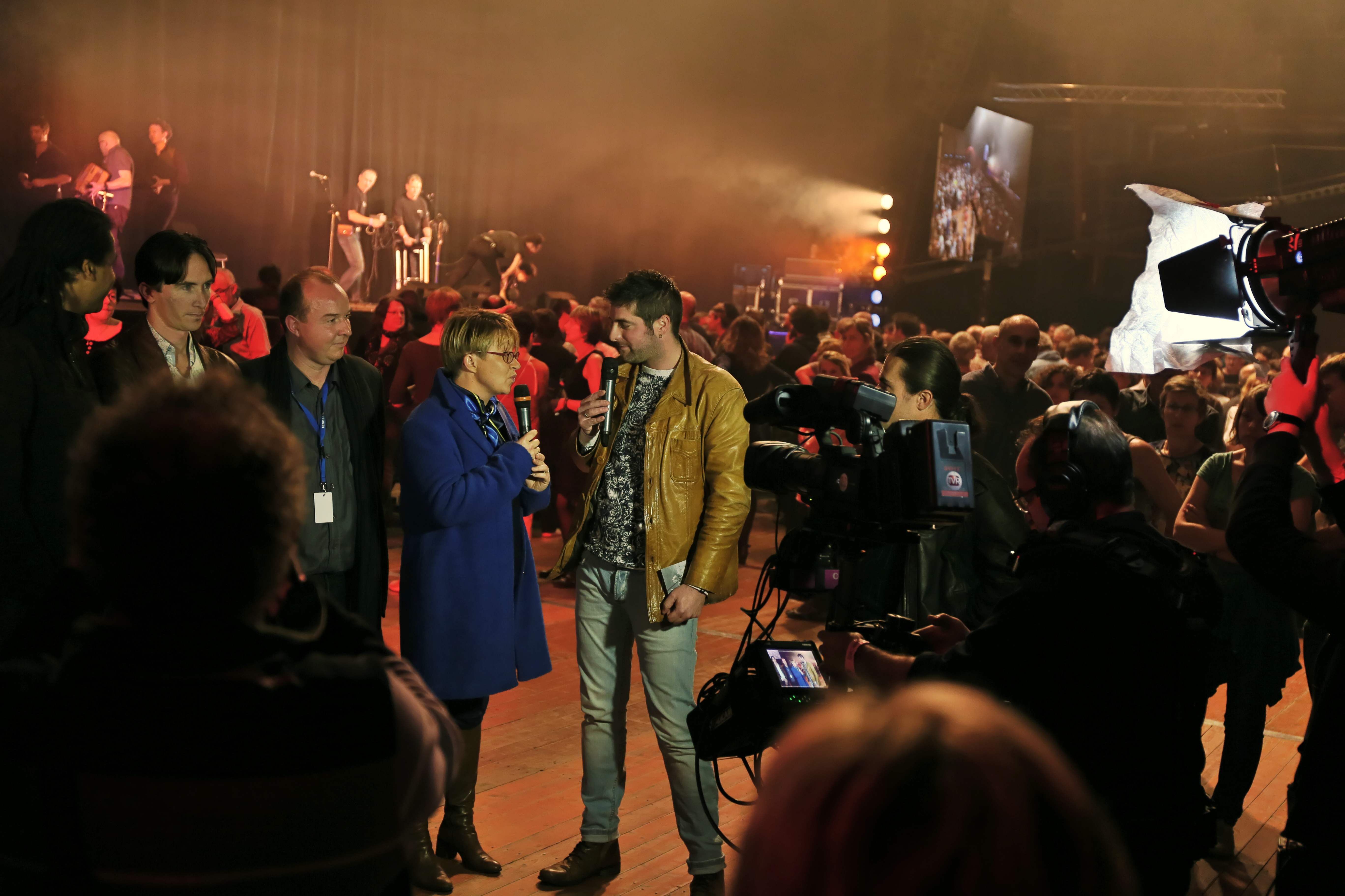 Glenn Jegou (Skeudenn Bro Roazhon) et Nathalie Appéré (maire de Rennes) interviewés par Thelo Mell (France 3 Bretagne) devant le fest-noz du festival Yaouank le 21 novembre 2015 au Parc des Expositions de Rennes.